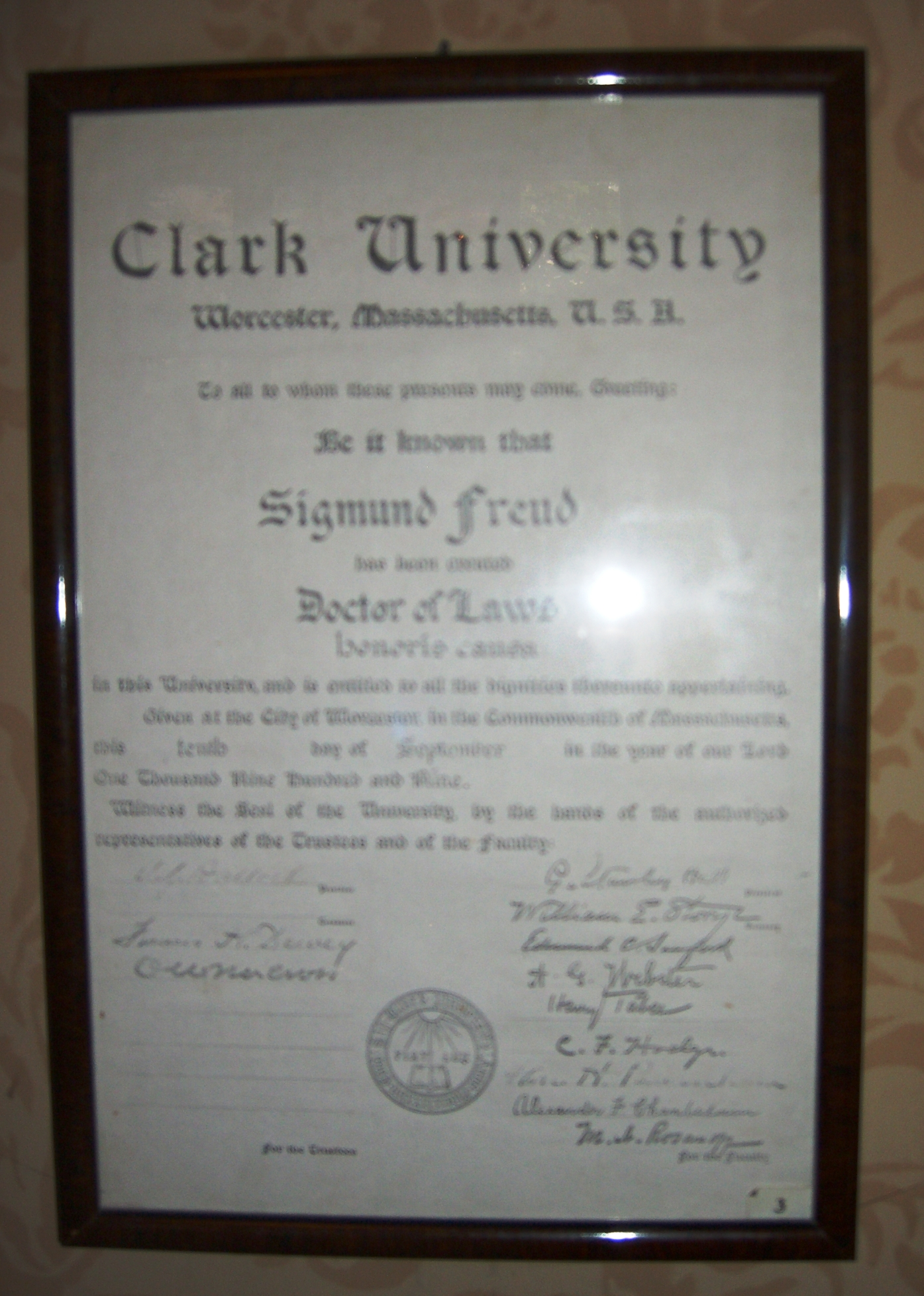 Título que obtuvo Sigmund Freud de Doctor of Laws Honoris Causa de la Universidad Clark